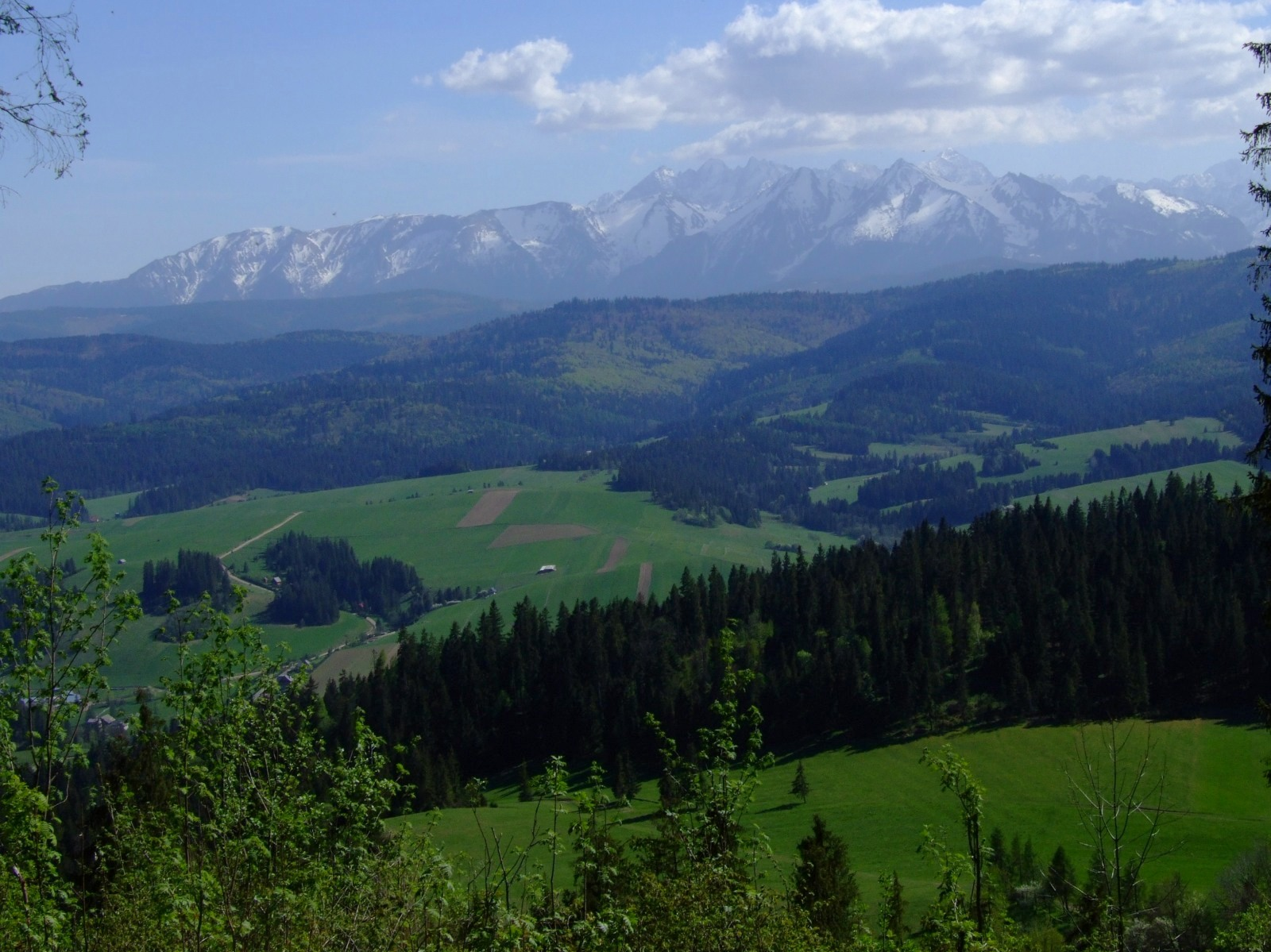 Zamagurze Spiskie i Tatry, widok z Pienin Spiskich (z Pastwiska Wapiennego)